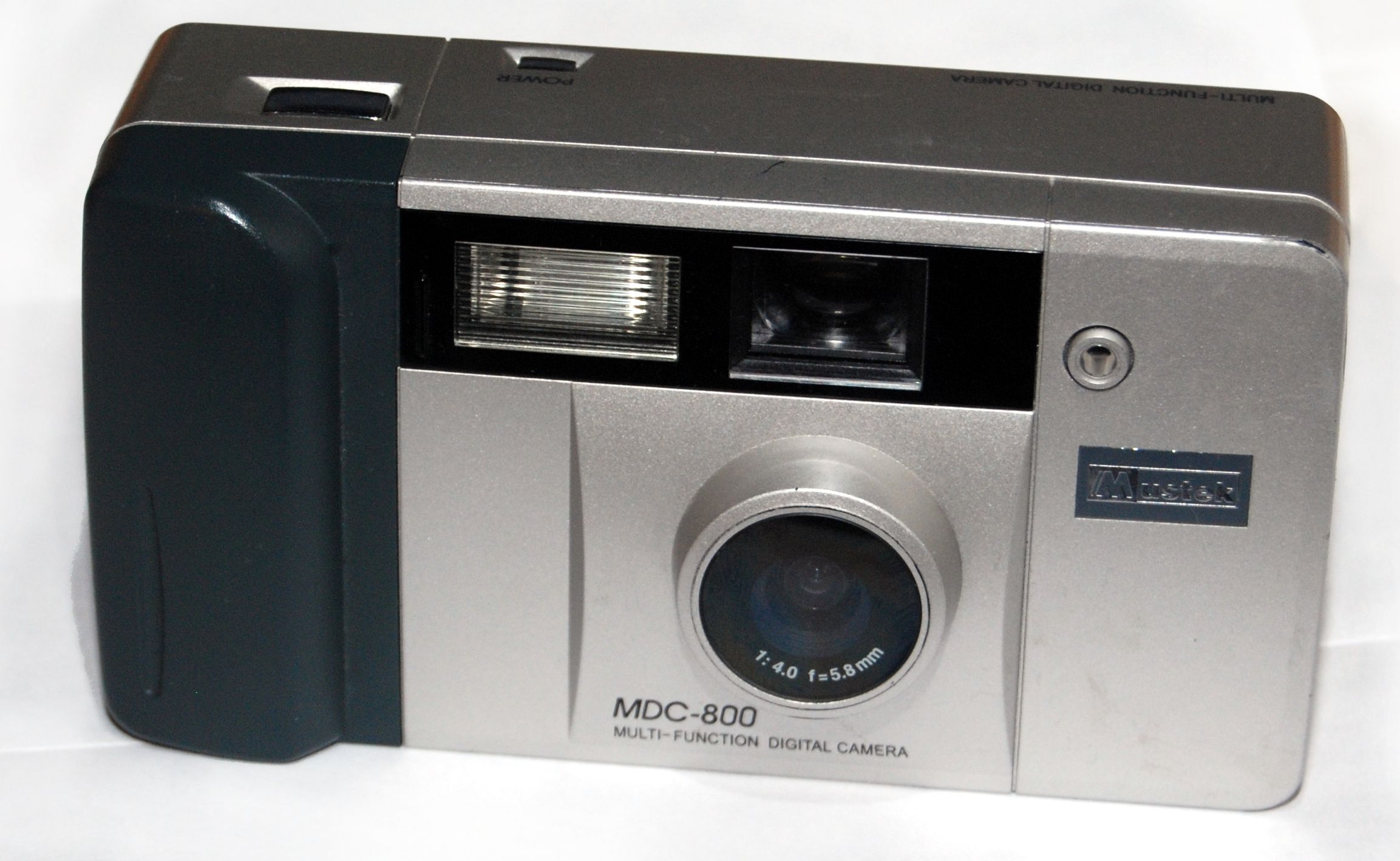 Mustek MDC 800 digital camera.